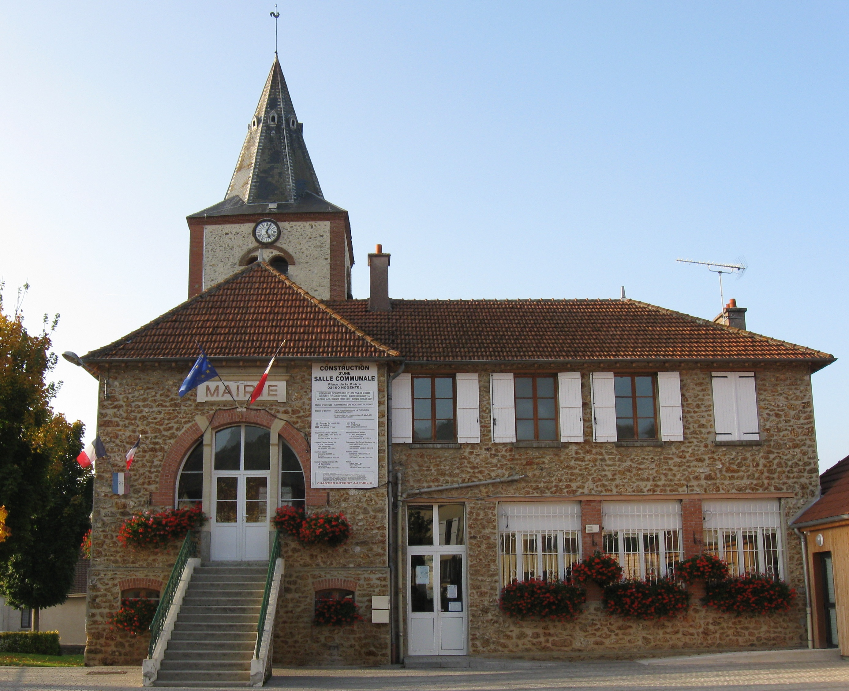 Mairie de Nogentel. (département de l'Aisne, région Picardie).